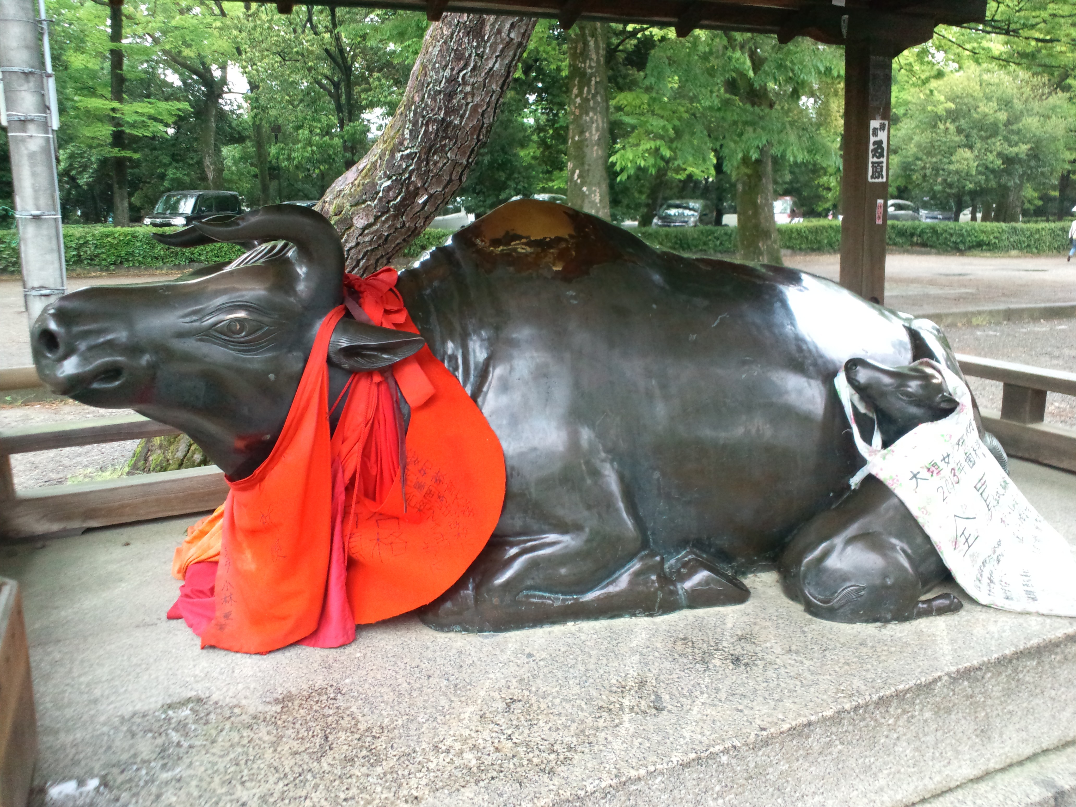 北野天満宮 臥牛像